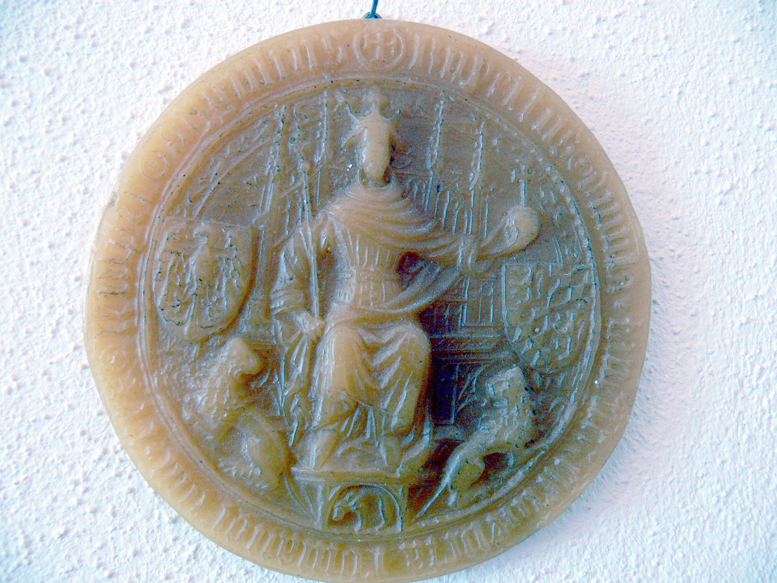 Siegel des deutschen Königs Ruprecht von der Pfalz 1401.